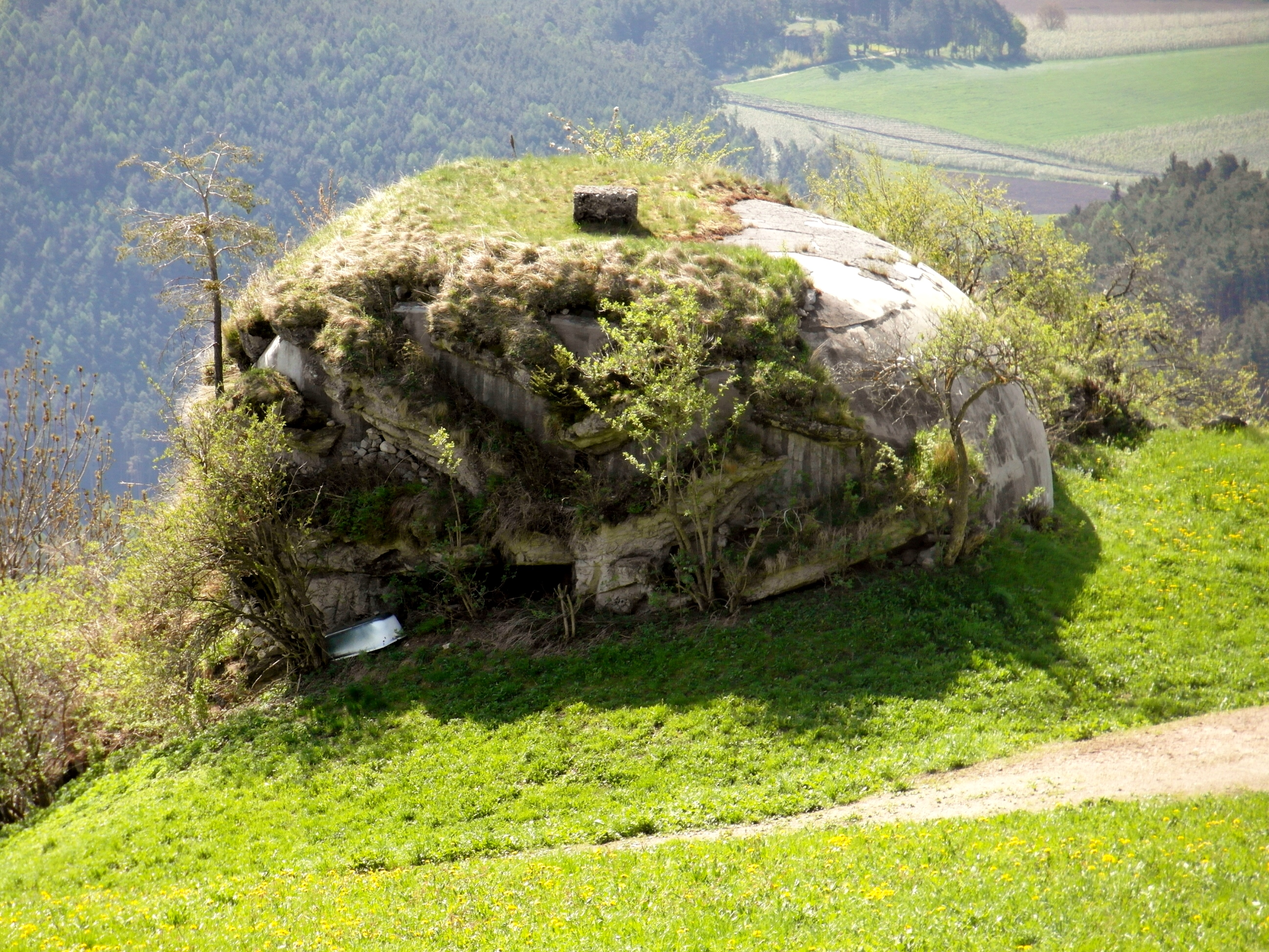 Opera 23 Sciaves